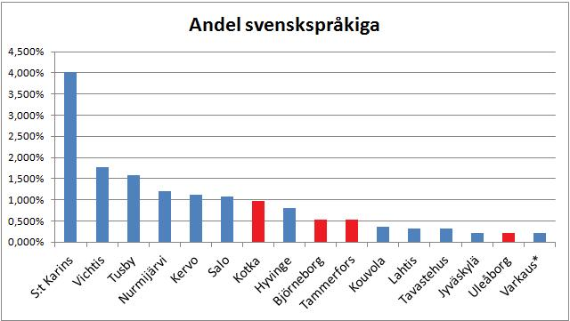 Andel svenskspråkiga på de svenska språköarna i Finland. De traditionella språköarna är markerade i rött medan de s.k. nya språköarna i blått. Källa: Svenska språköar och finska utskär (Magma-studie 3/2013)